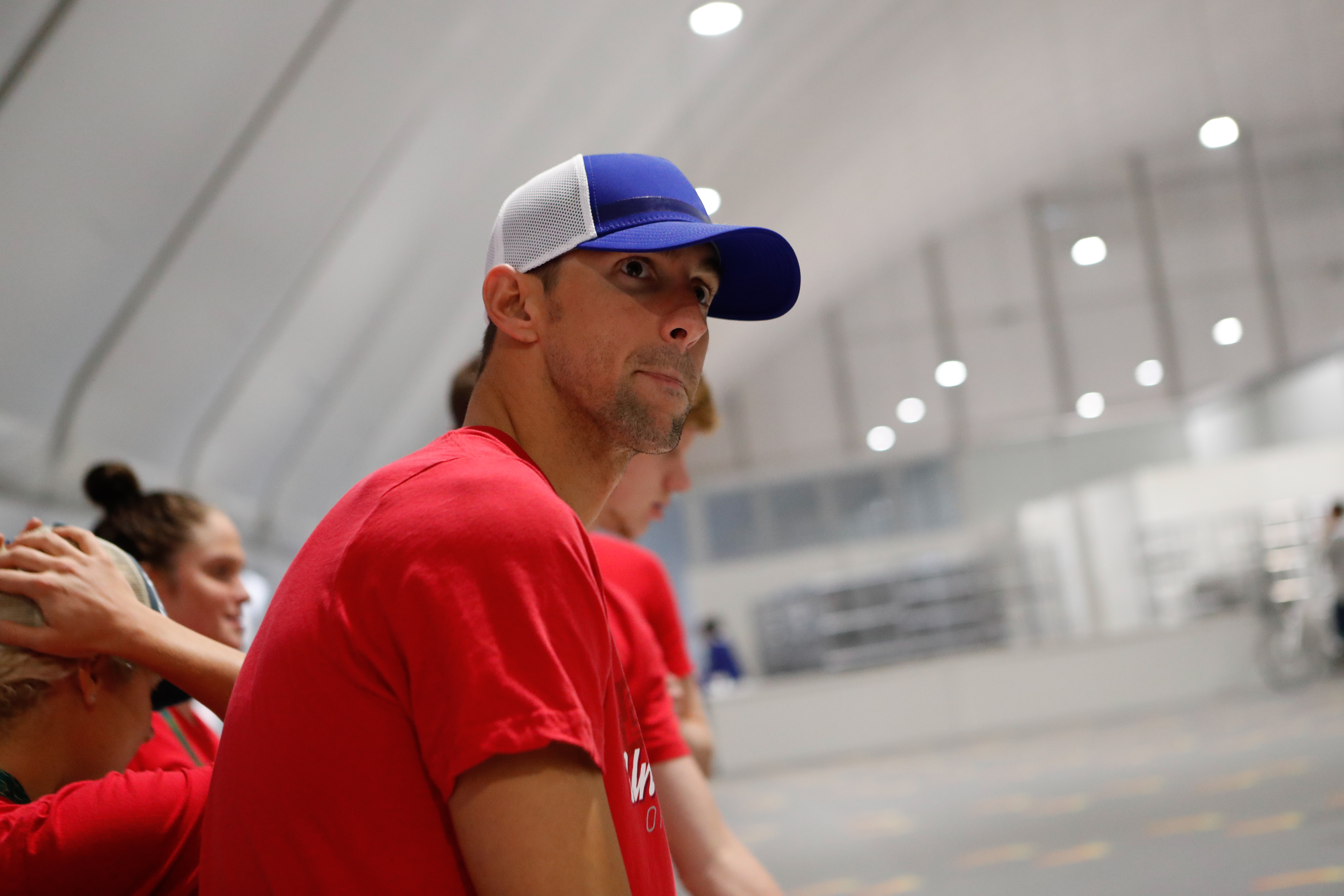 Rio de Janeiro - O nadador Michael Phelps, norte-americano recordista de medalhas olímpicas, no restaurante dos atletas, na Vila Olímpica dos Jogos Rio 2016 (Fernando Frazão/Agência Brasil)